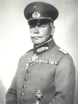 Porträt des Generals Wilhelm Heye.